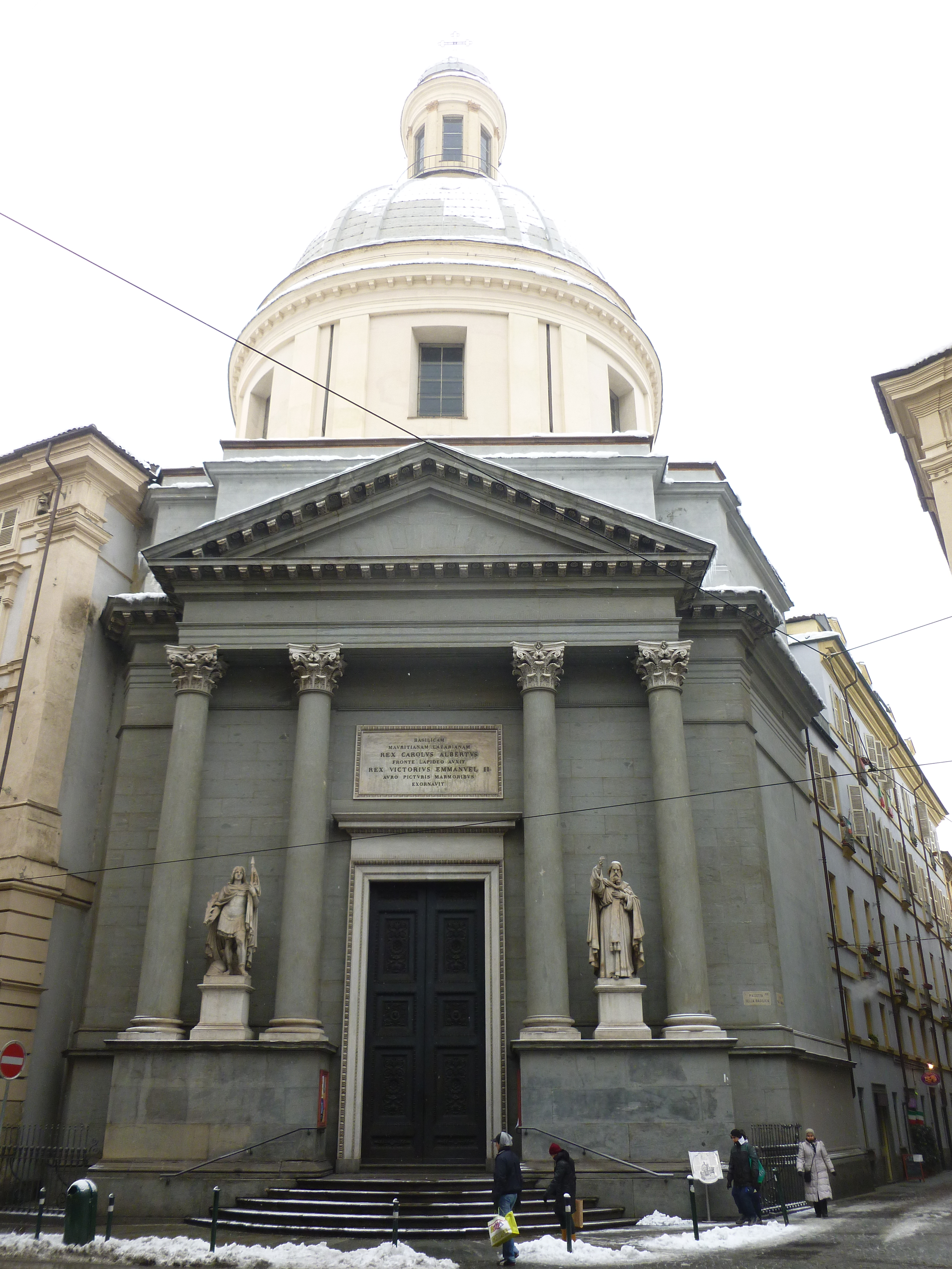 Basilica Mauriziana. Torino, via Milano, 20.